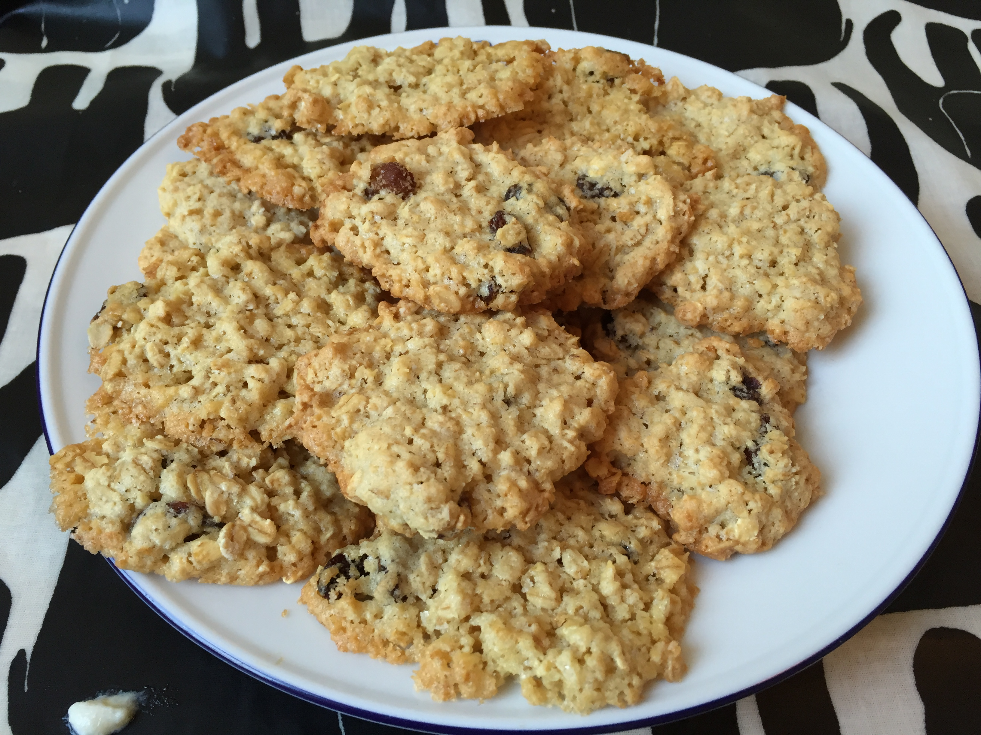 haferkookjes